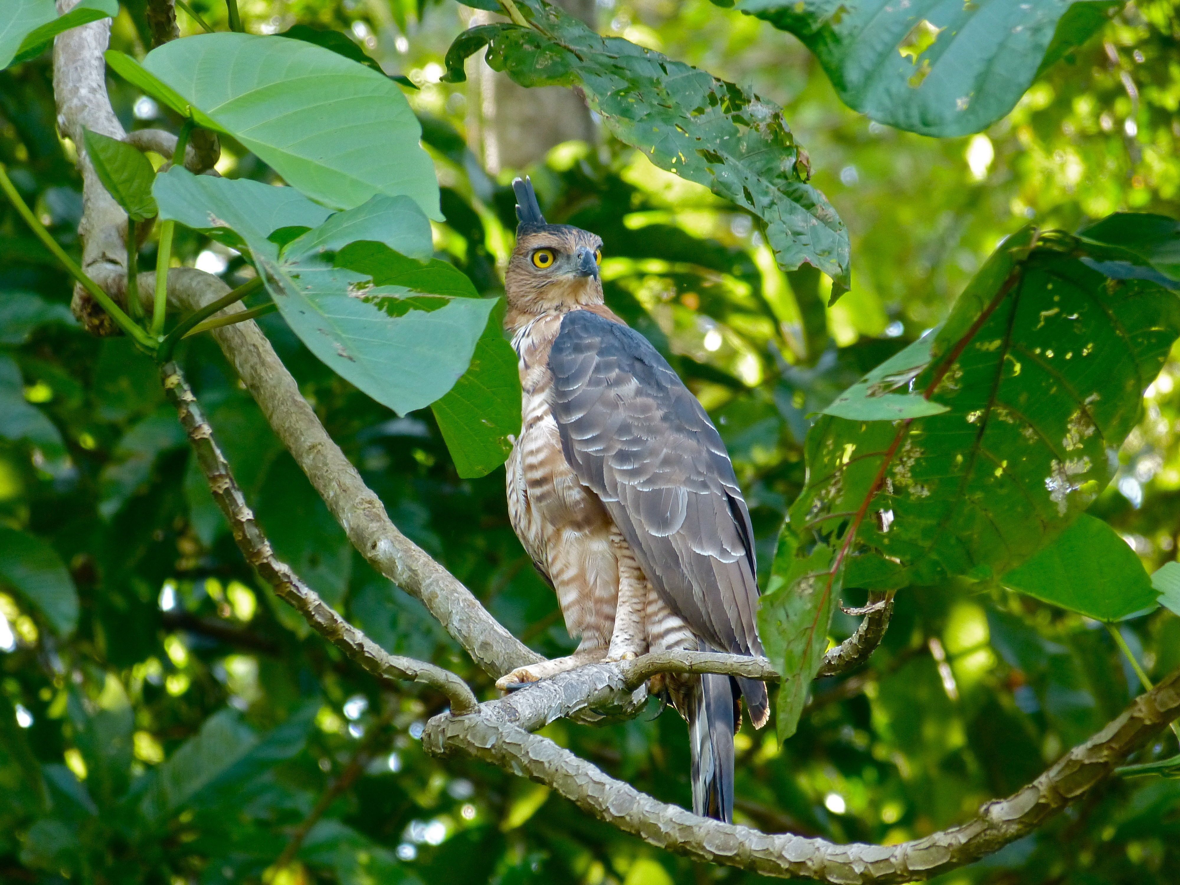 Kinabatangan River, Sukau, Sabah, MALAYSIA